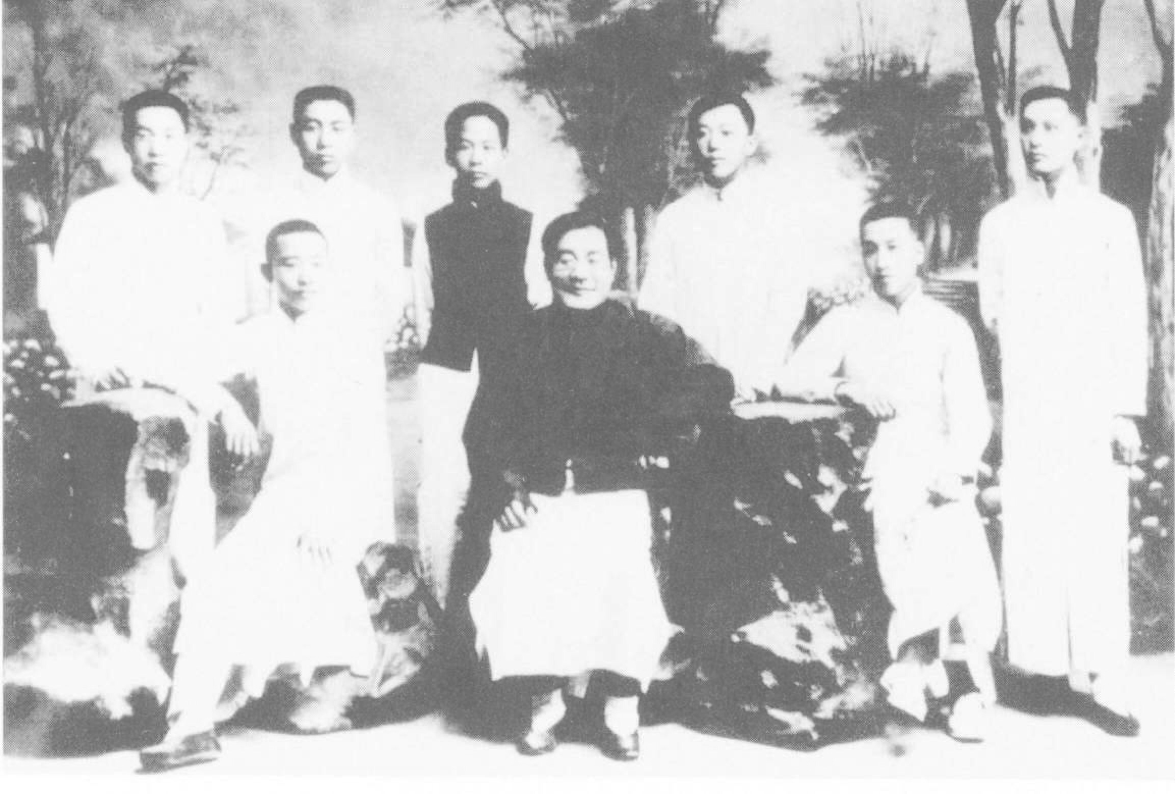 1916年南开学校国文教师张暤如与部分国文优秀学生合影（后排左二为周恩来）